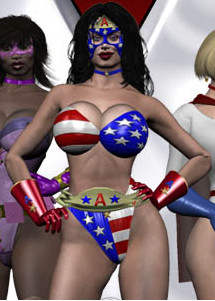 Ms. Americana